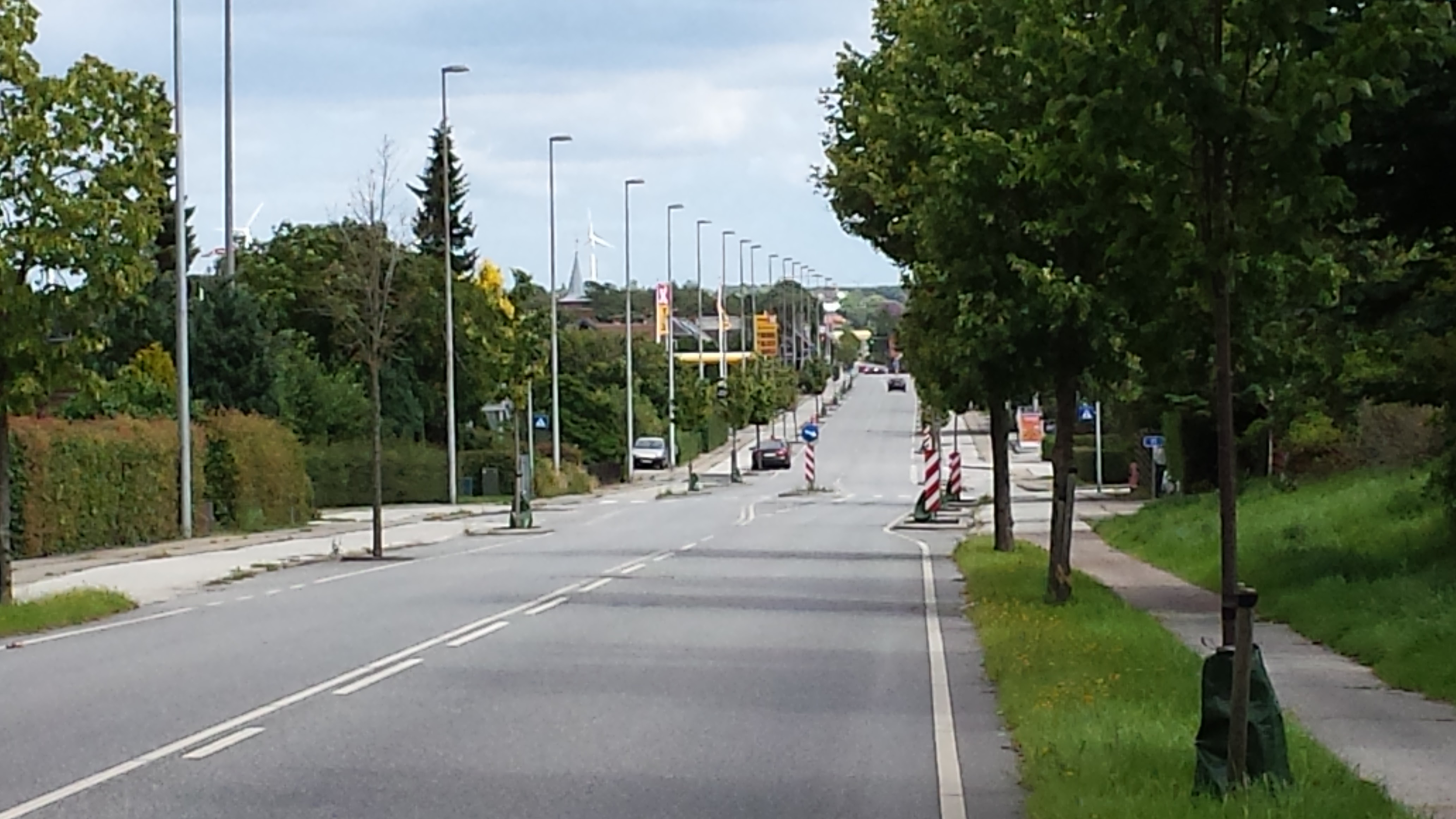 Byens hovedgade.